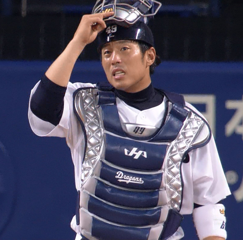 ドラゴンズ武山真吾